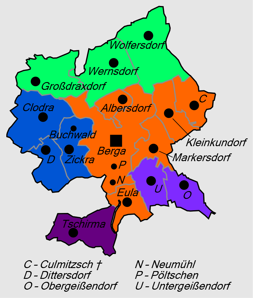 Gliederung der Stadt Berga/Elster ab 15. Mai 1974